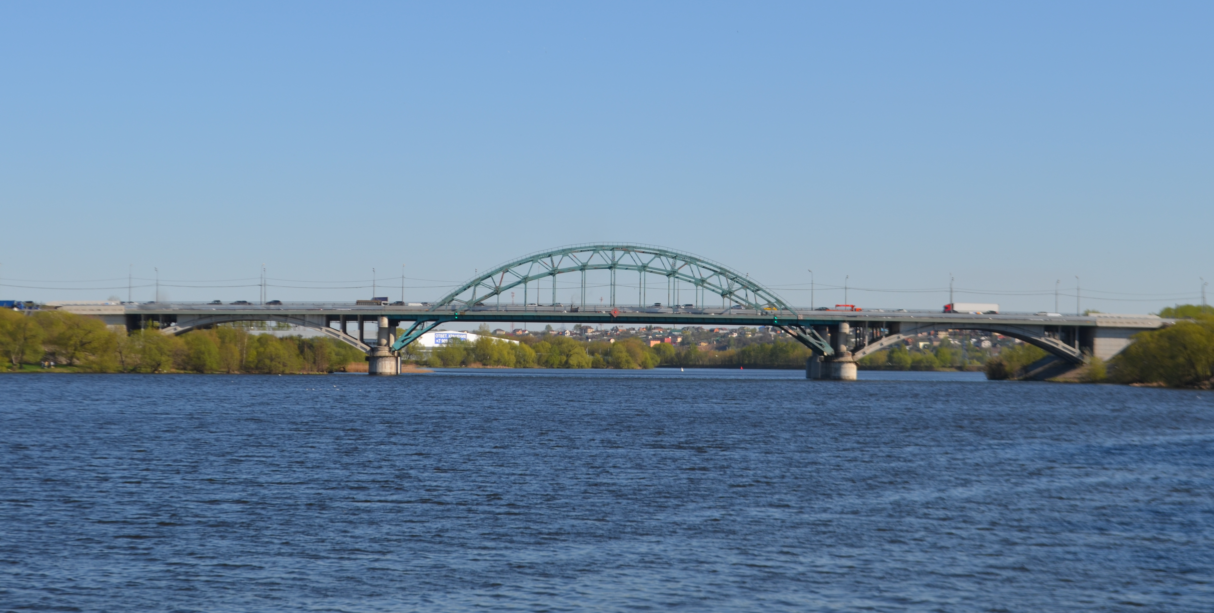 Вид на Бесединские мосты из парка парка «Братеевская пойма». Ближайший на фото мост — из района Капотня в район Братеево (расположен выше по течению Москвы-реки)